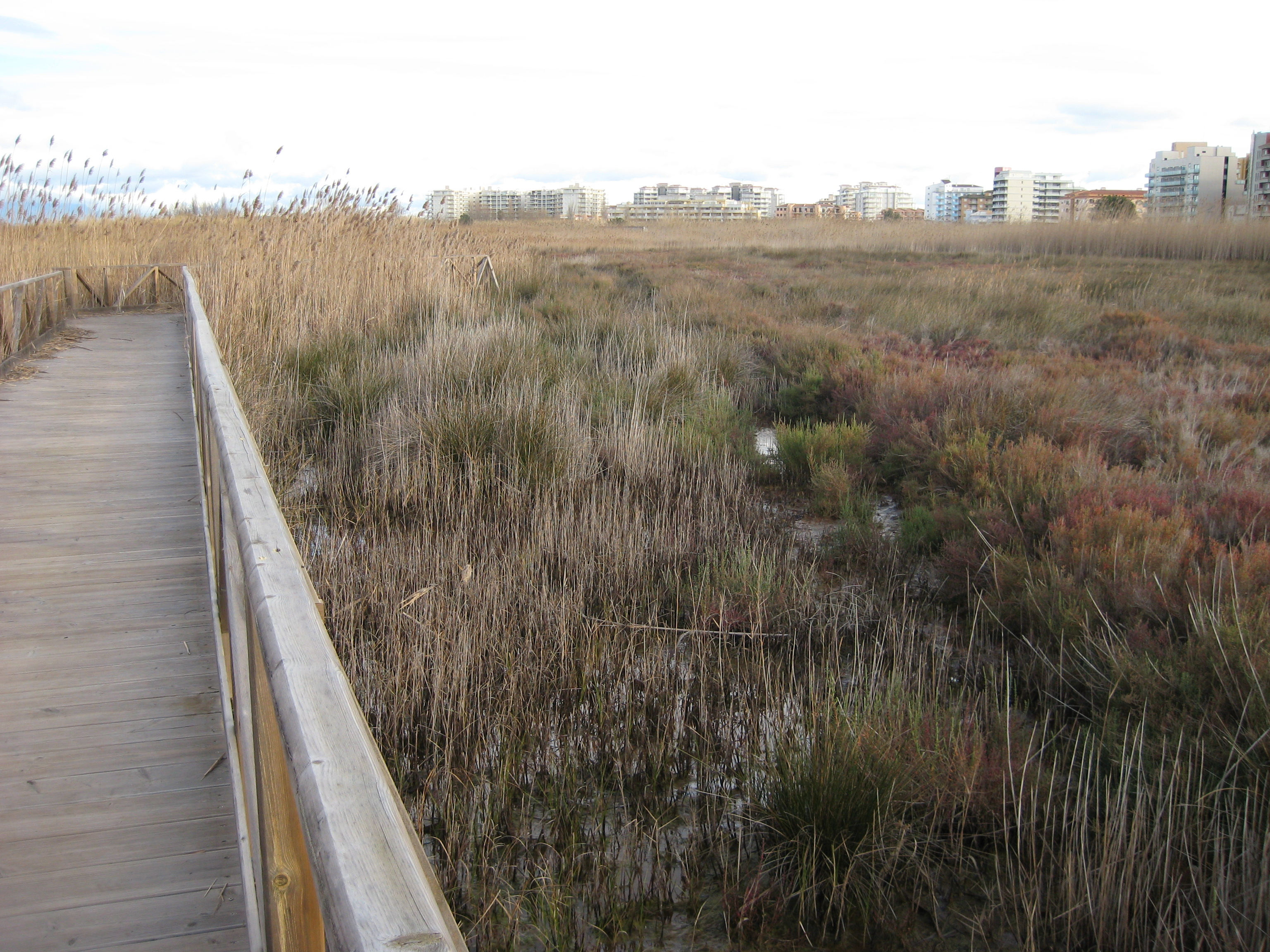 Part nord de la marjal, prop de l'assagador de la Creu, a Peníscola (Baix Maestrat)